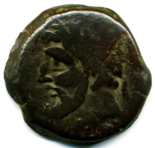 Monnaie représentant Massinissa, Algérie